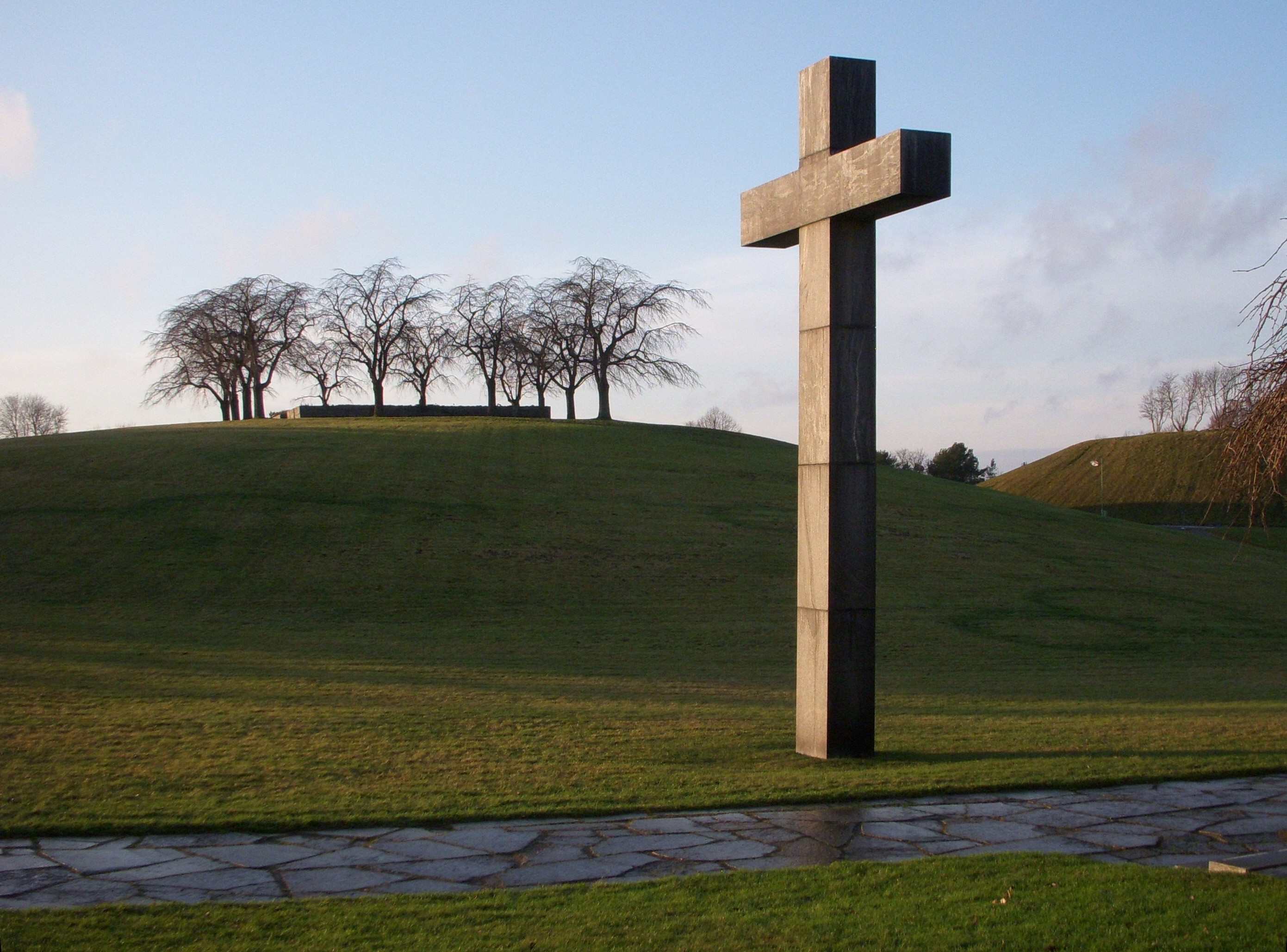 Almhöjden, Skogskyrkogården, Stockholm